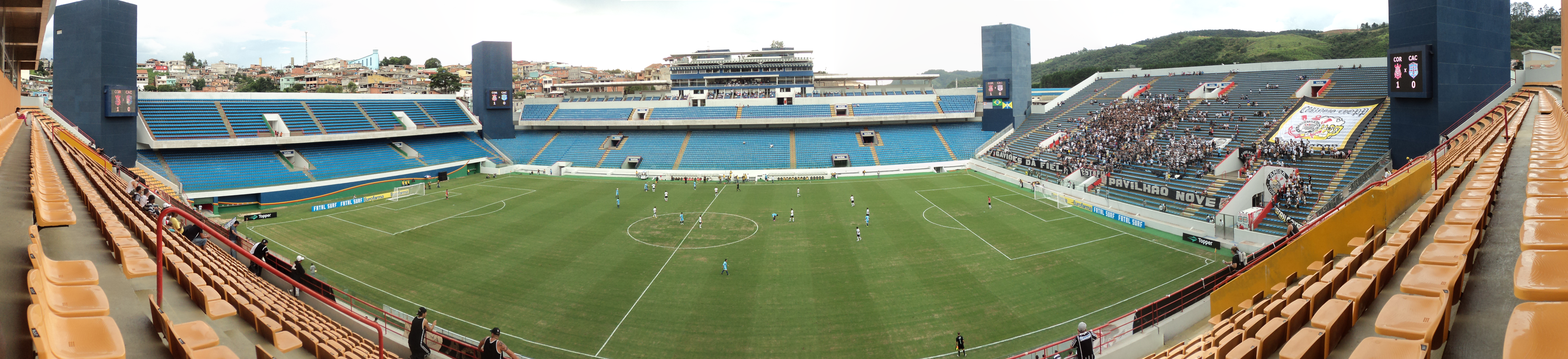 Panorâmica da Arena Barueri, durante jogo entre Corinthians e Cacerense pela Copa São Paulo de Futebol Júnior.